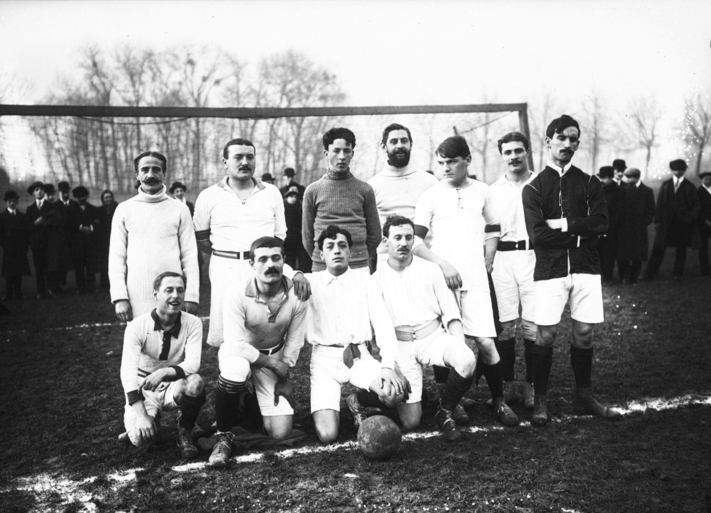 Equipe de football du Pitray Olier, Championne de France FGSPF au début du XX° siècle